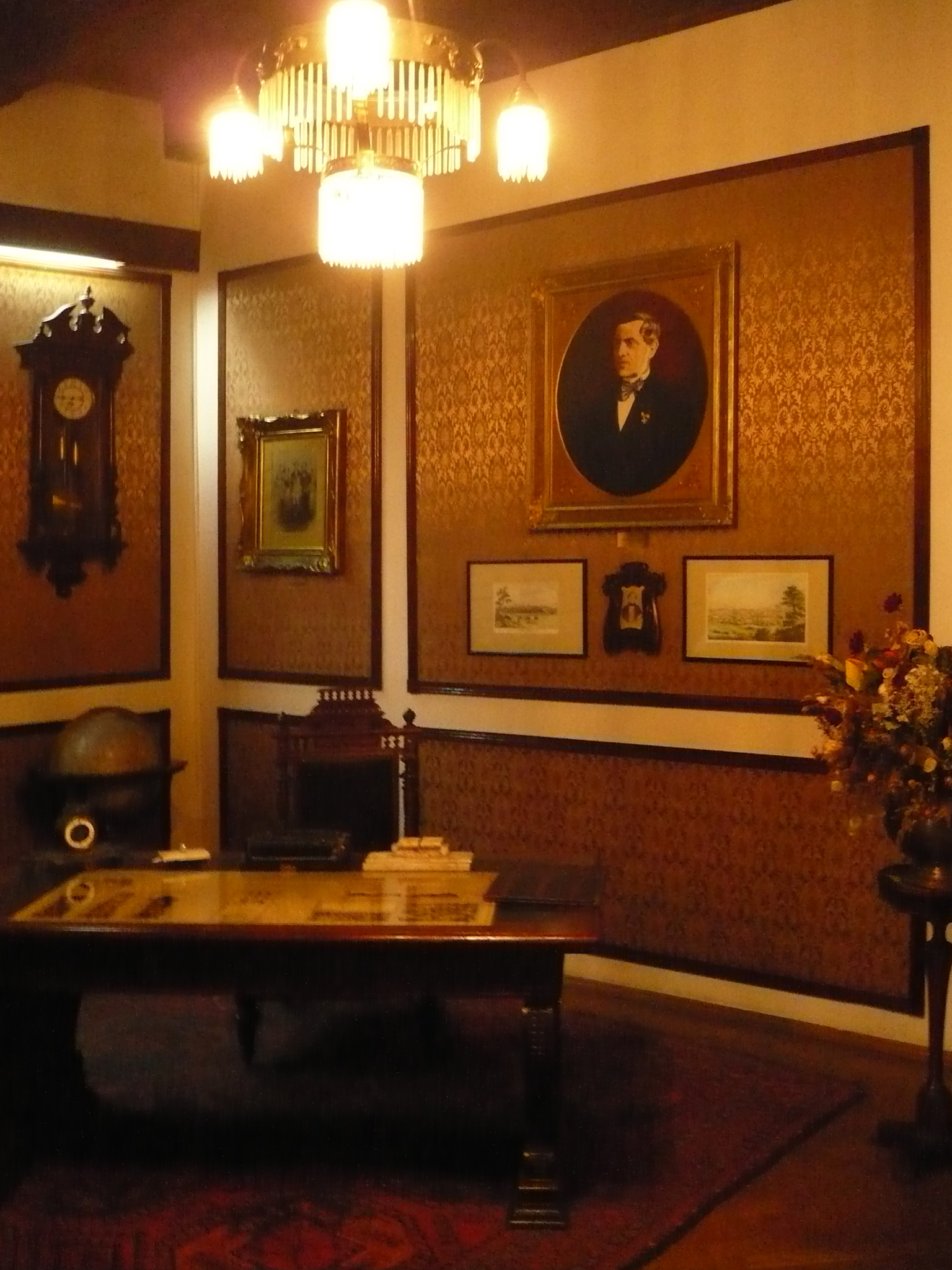 Gabinet Gustava Beckera